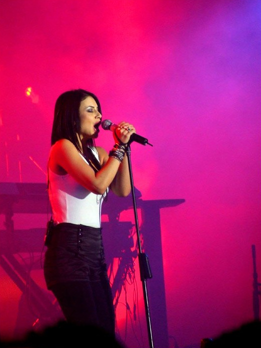 Ninet Tayeb נינט טייב במופע שאירגן ארקדי גאידמק בפארק הירקון, יום העצמאות תשס"ז